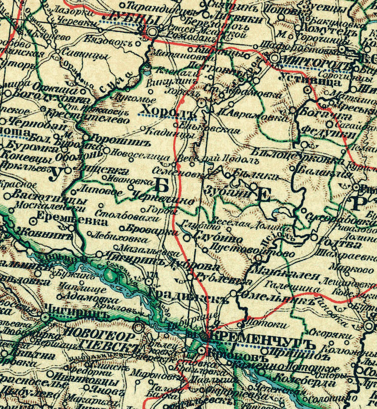 Кременчуцький повіт Полтавської губернії